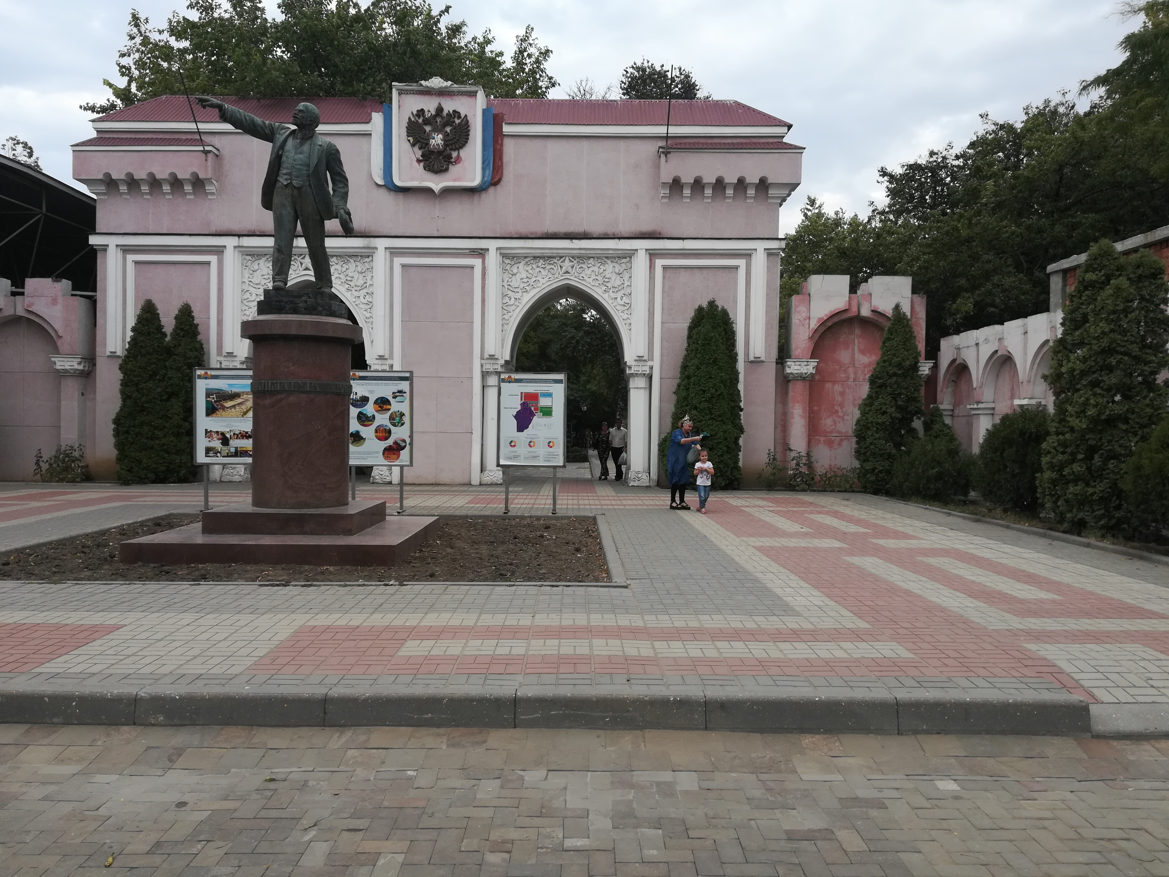 Махачкала. Городской сад